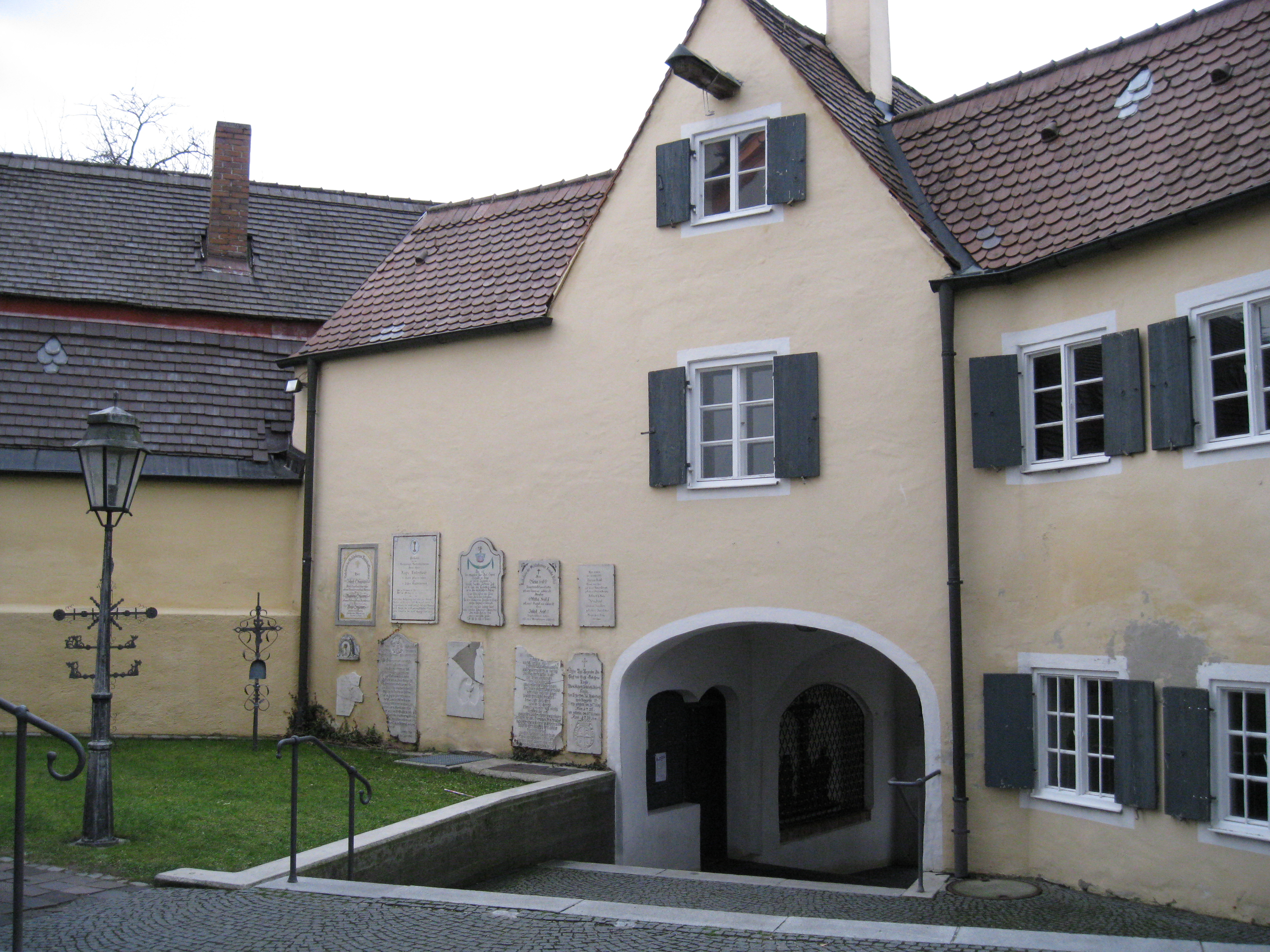 Mering in Bayern, Landkreis Aichach, unweit von Augsburg